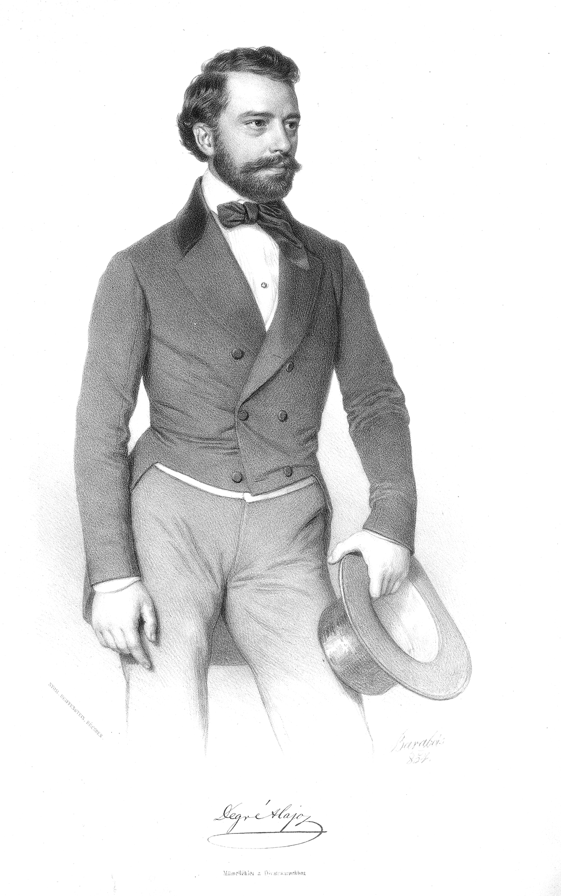 Degré Alajos portréja